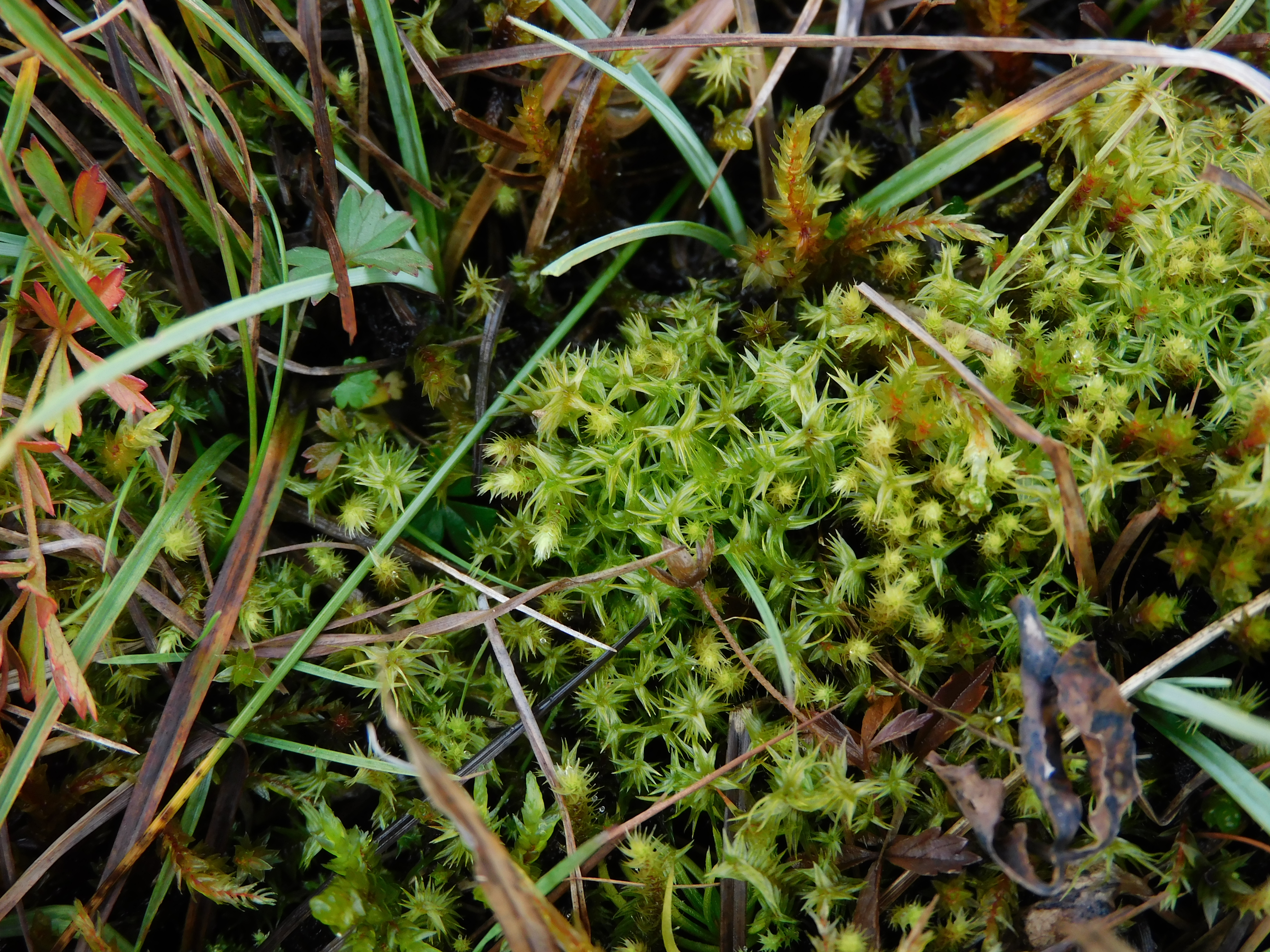 Meesia triquetra in einem subalpinen Schwingrasen in den Chiemgauer Alpen.